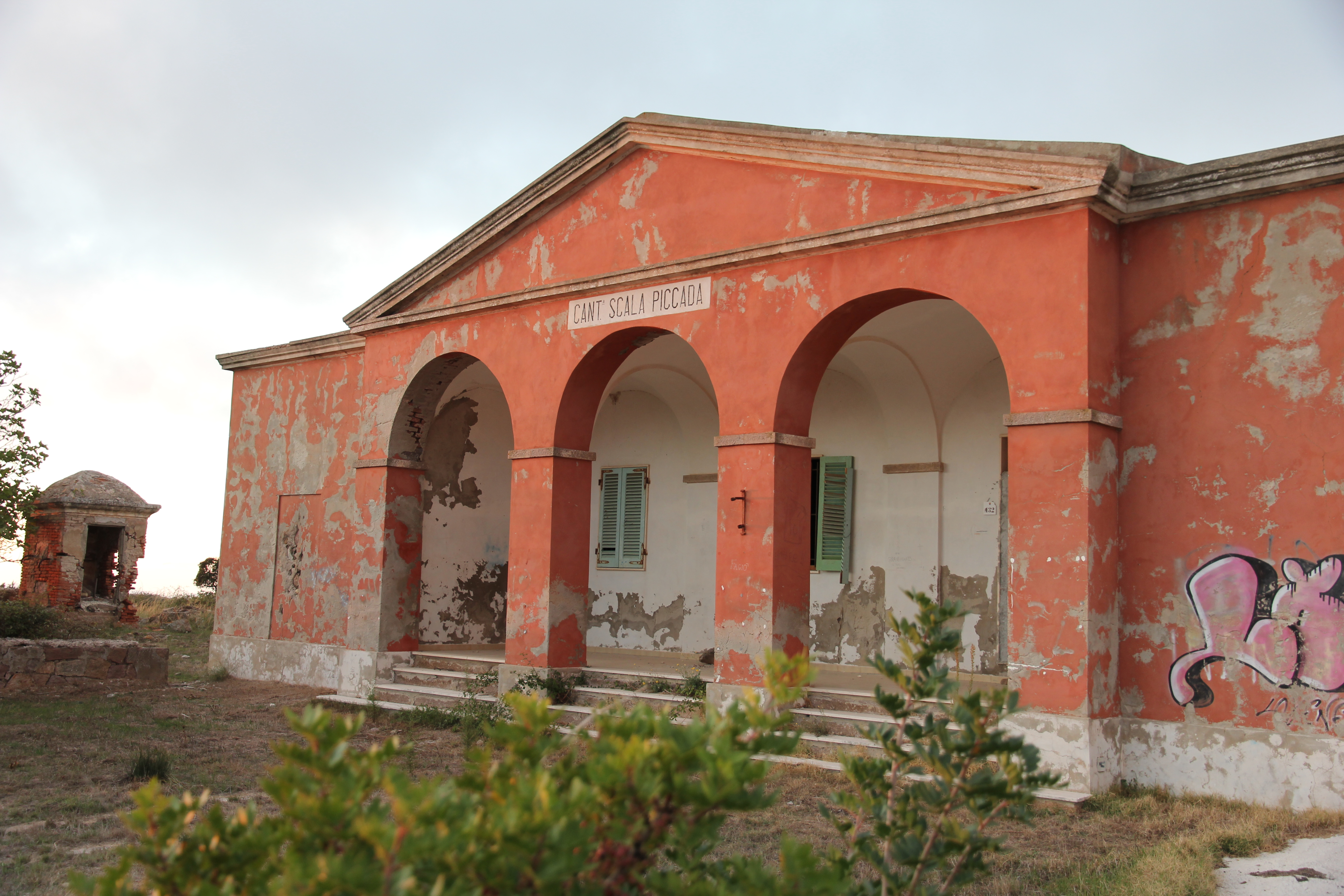 Alghero - Casa cantoniera di Scala Piccada - SS 292